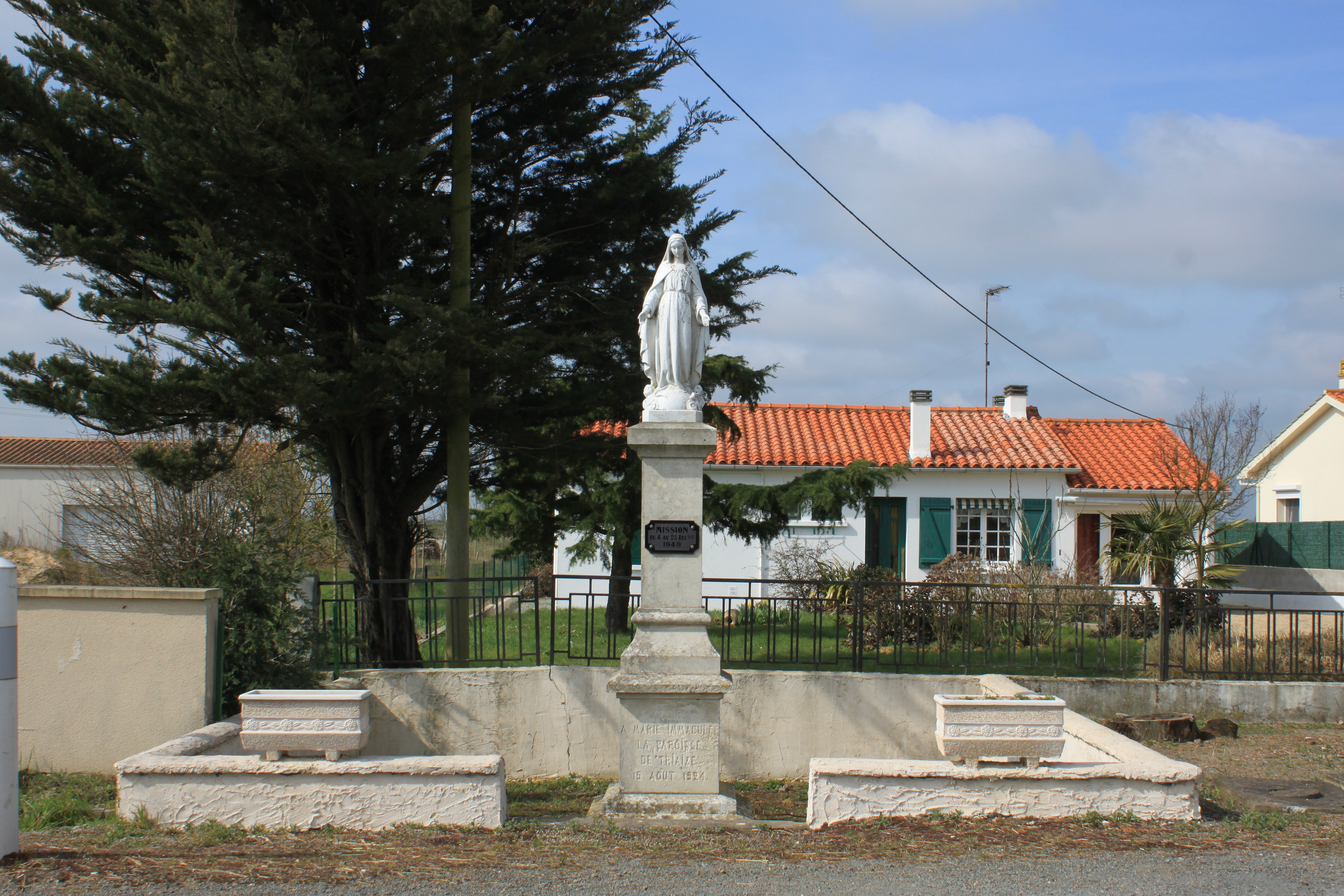 Vierge (août 1924, mission 1949), Fr-85-Triaize.